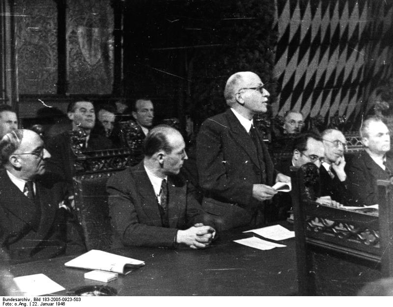 Erste Pressekonferenz der bayer. Staatsregierung am 22.1.46 Minister Terhalle spricht. Illus/BP München